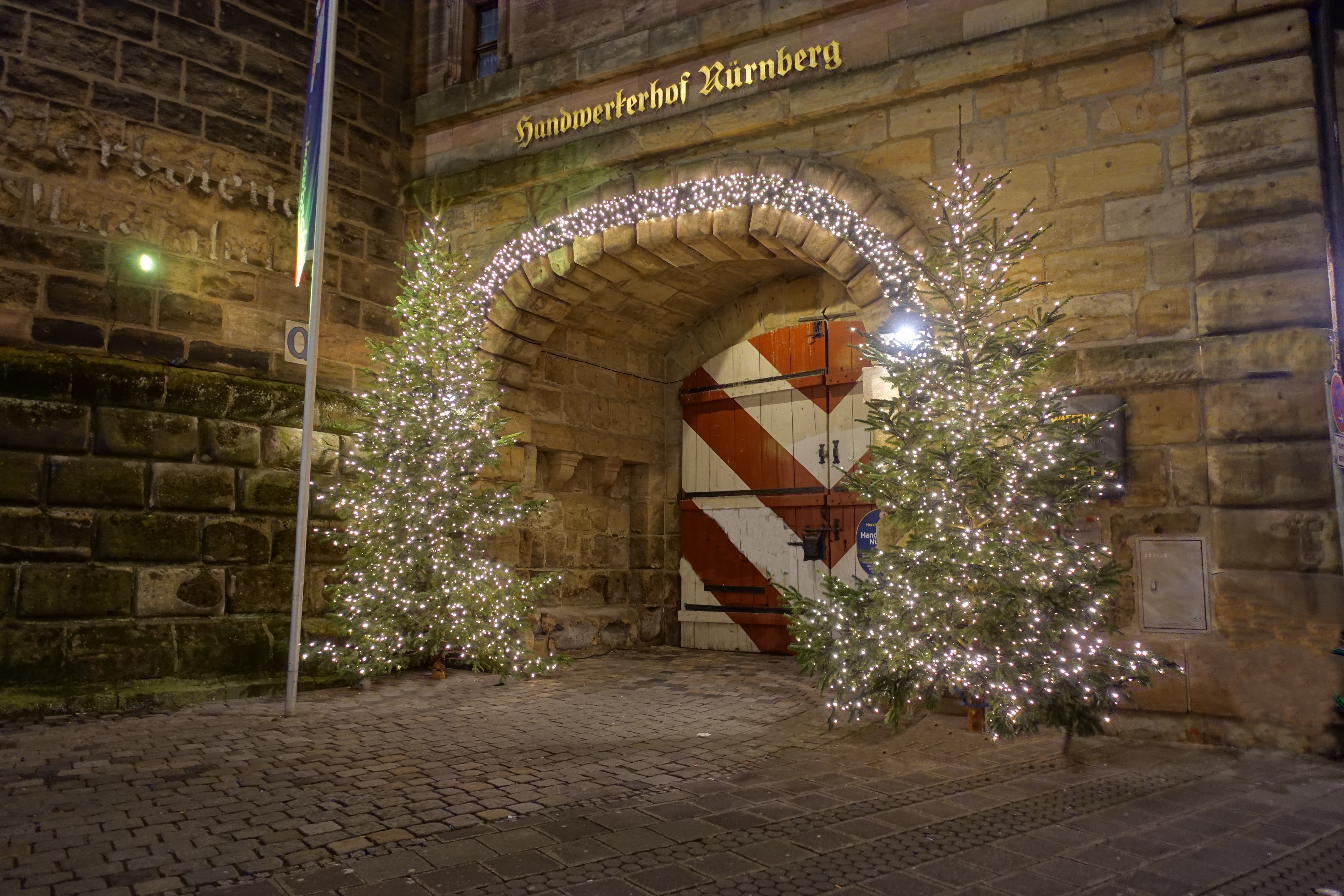 Handwerkerhofeingang in der Weihnachtszeit